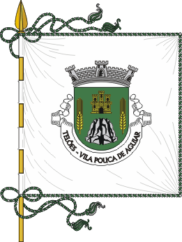 Estandarte da freguesia de Telões (concelho de Vila Pouca de Aguiar)